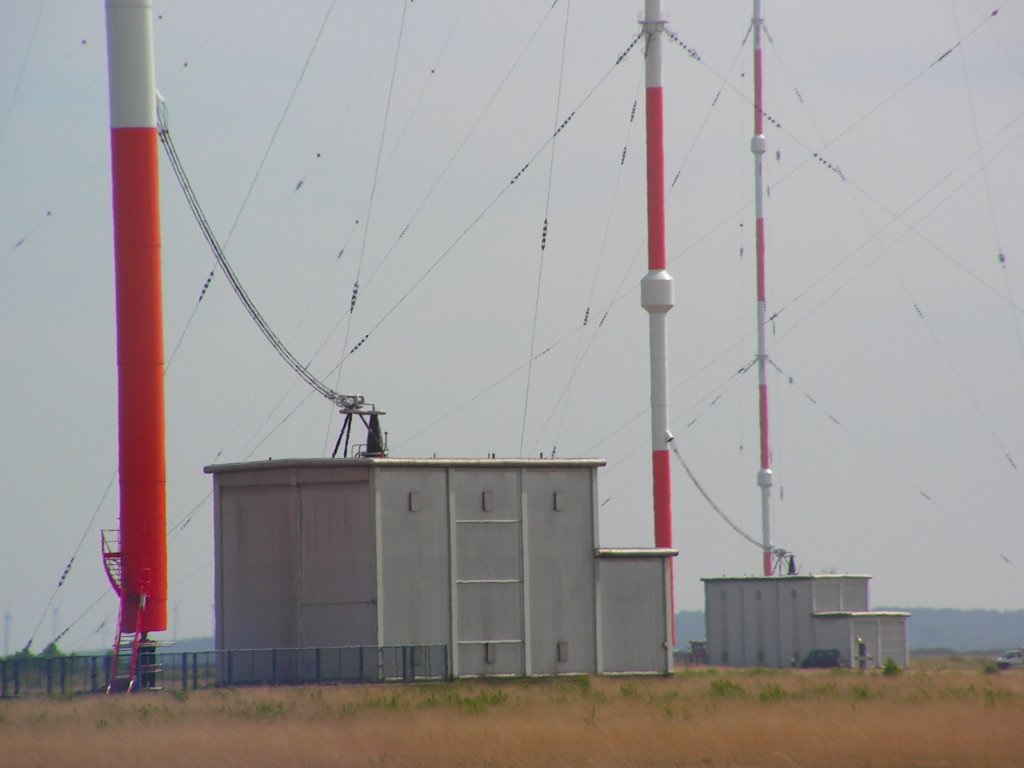 Abstimmmittel-Häuser des Marinesenders DHO38 – Längstwellensender der Marine der Bundeswehr, in der Nähe von Saterland-Ramsloh im Landkreis Cloppenburg (Niedersachsen)